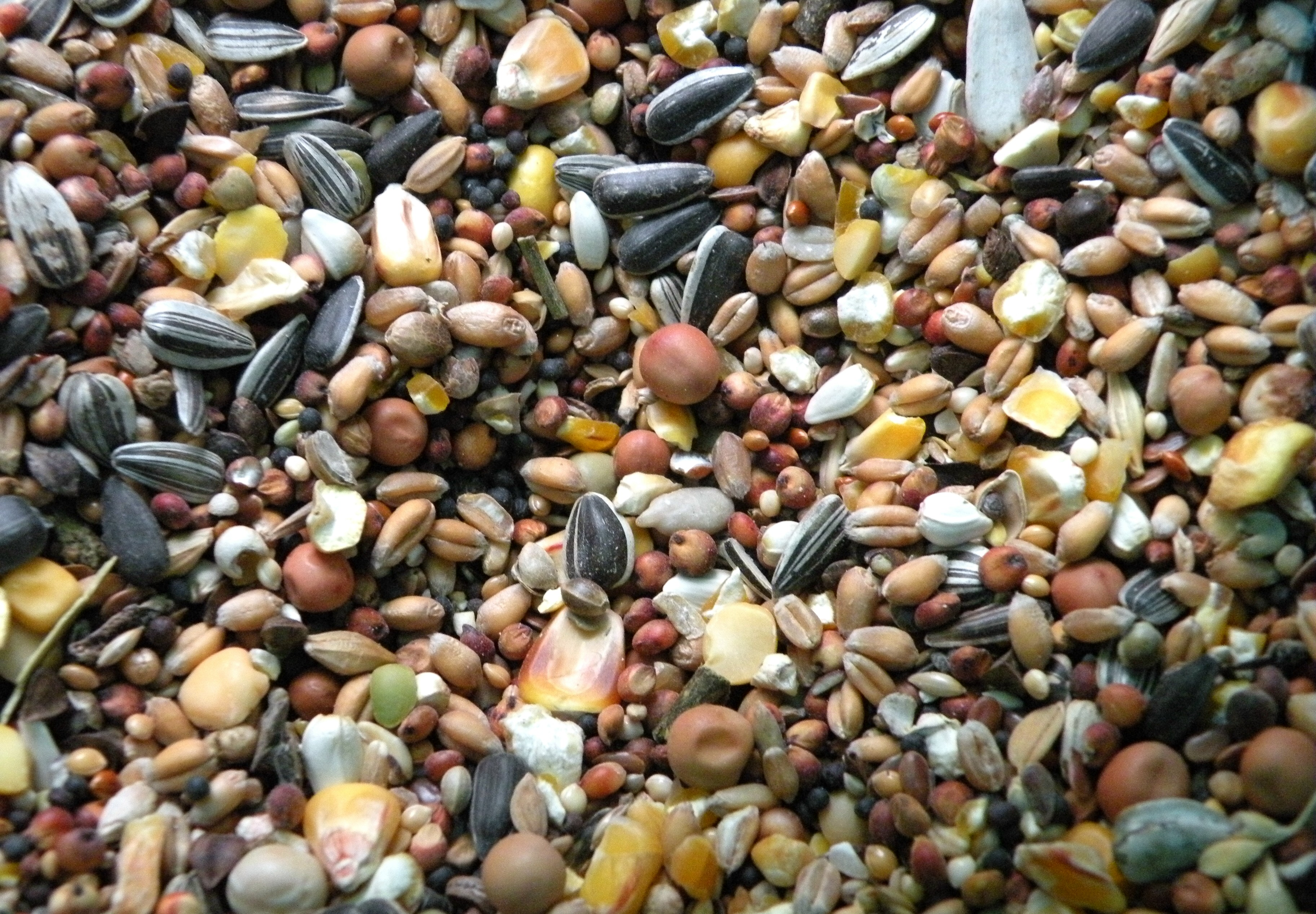 Gemengd vogelzaad (wintervoer)